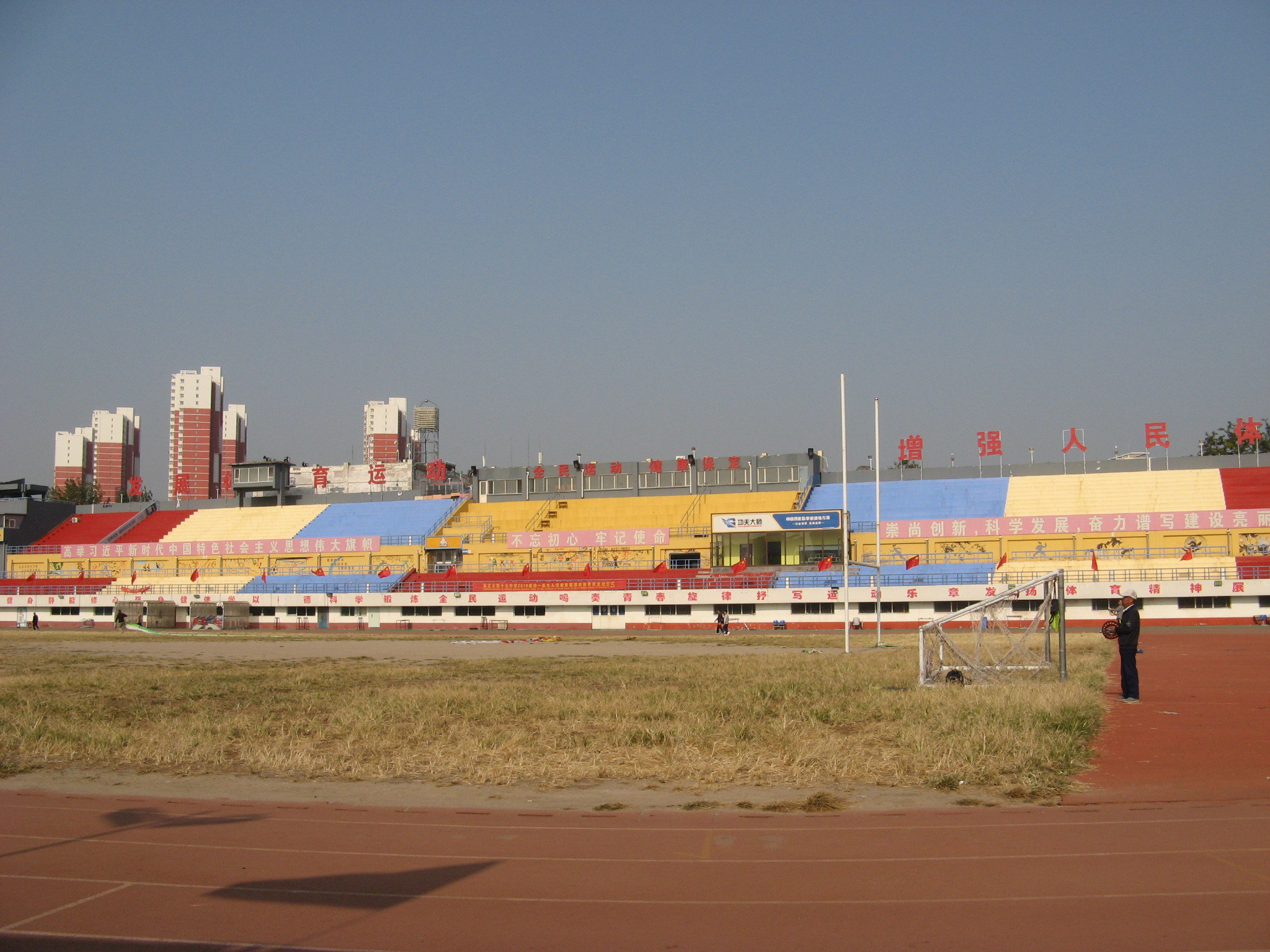 中华人民共和国河北省保定市，保定市人民体育场